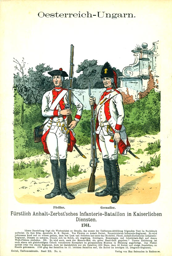 Иллюстрация Рихарда Кнотеля